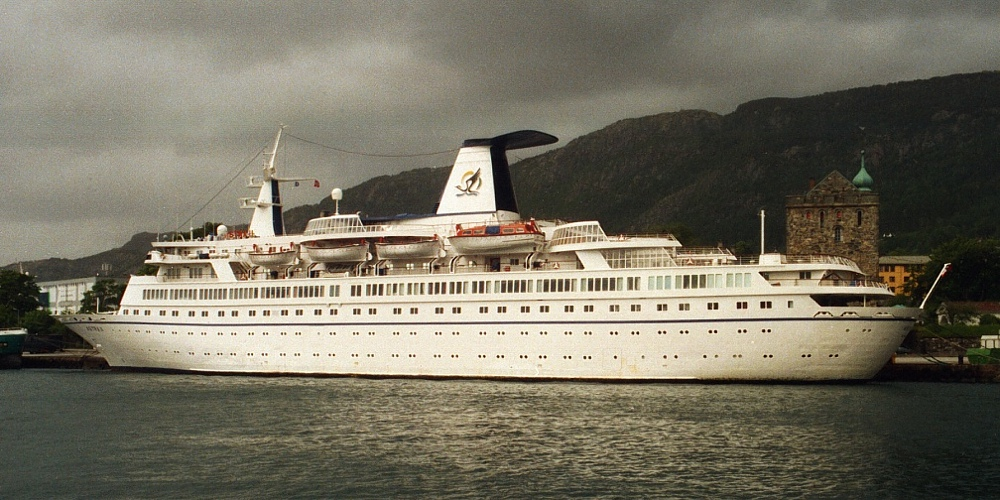 Kreuzfahrtschif "Astra II" im Hafen von Bergen, Norwegen (Sommer 2000)